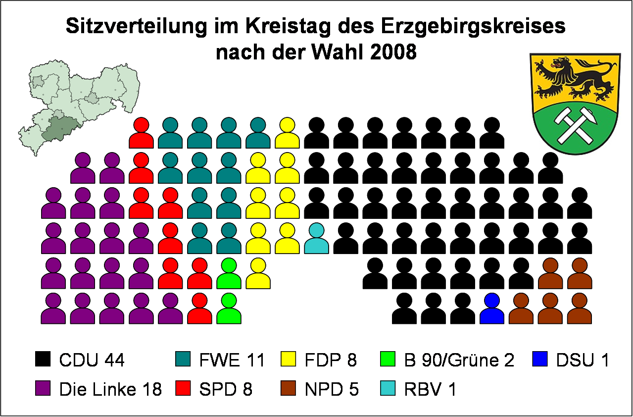 Sitzverteilung im Kreistag des Erzgebirgskreises nach der Wahl vom 8. Juni 2008